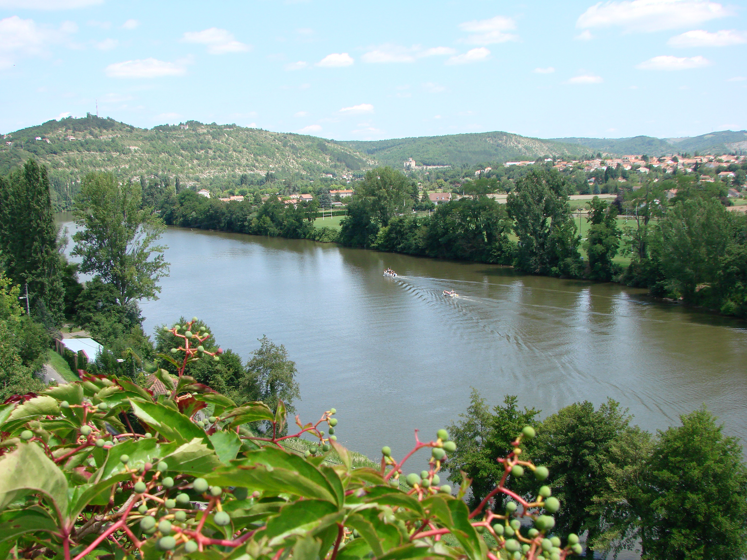 Le Lot à Cahors.